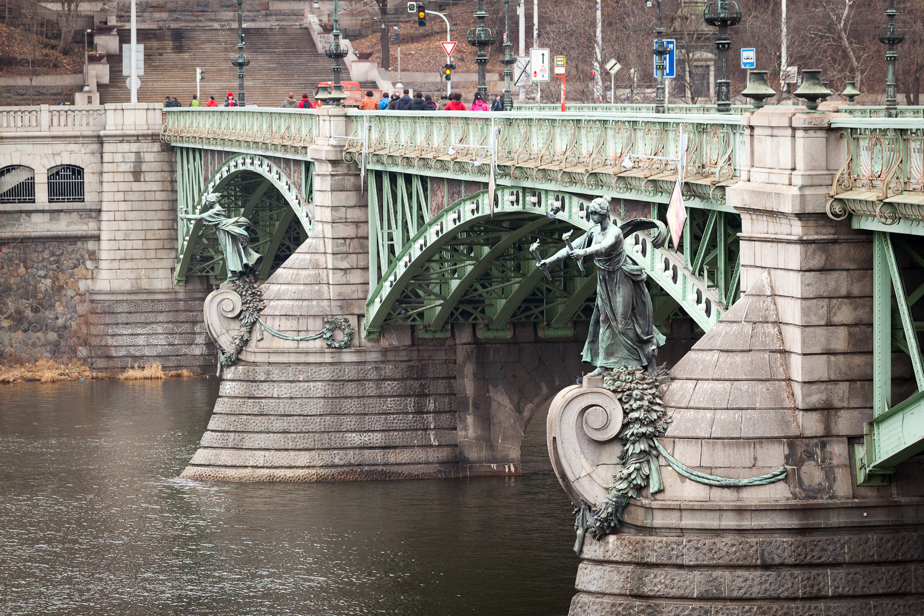 Prague